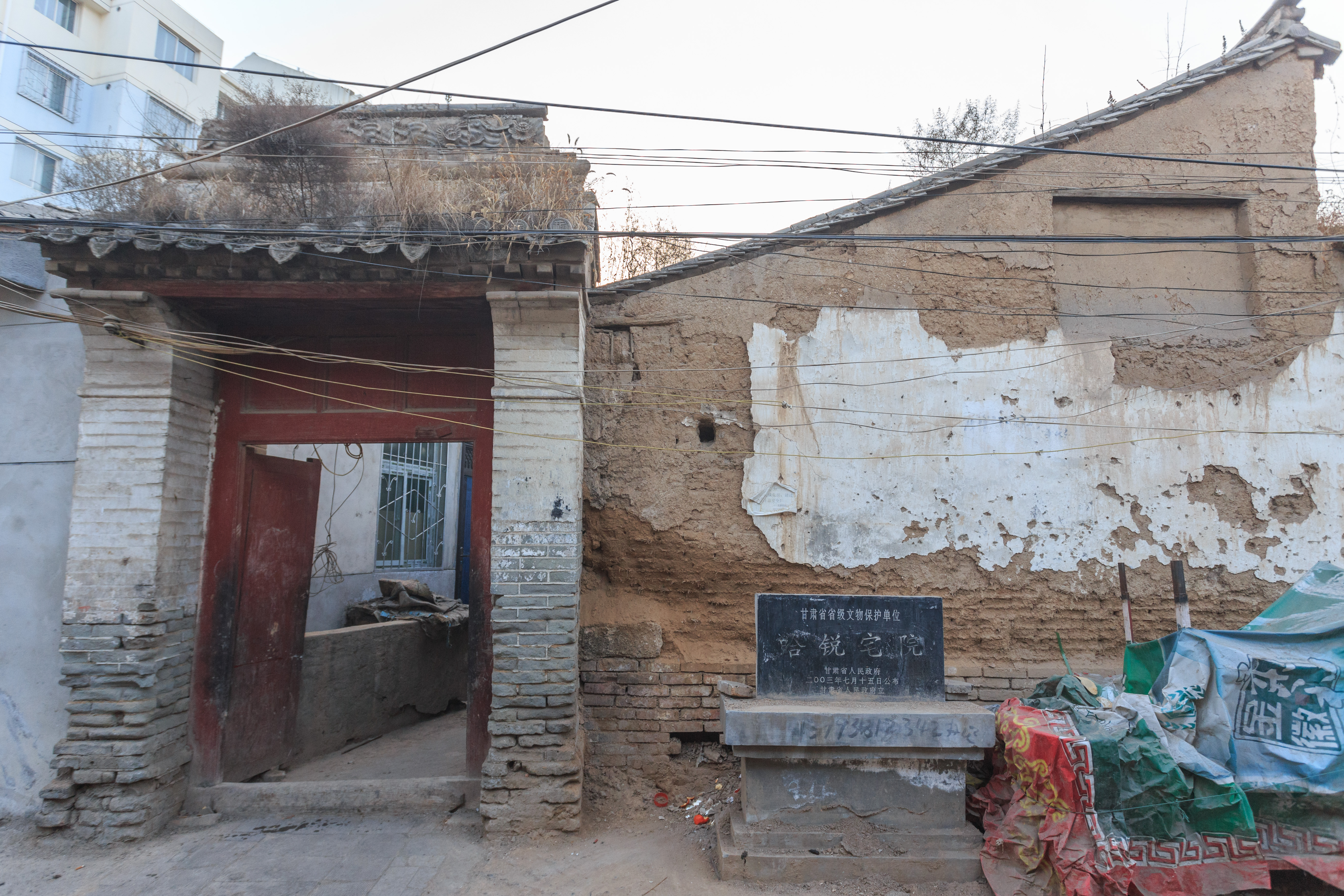 天水市哈锐宅院